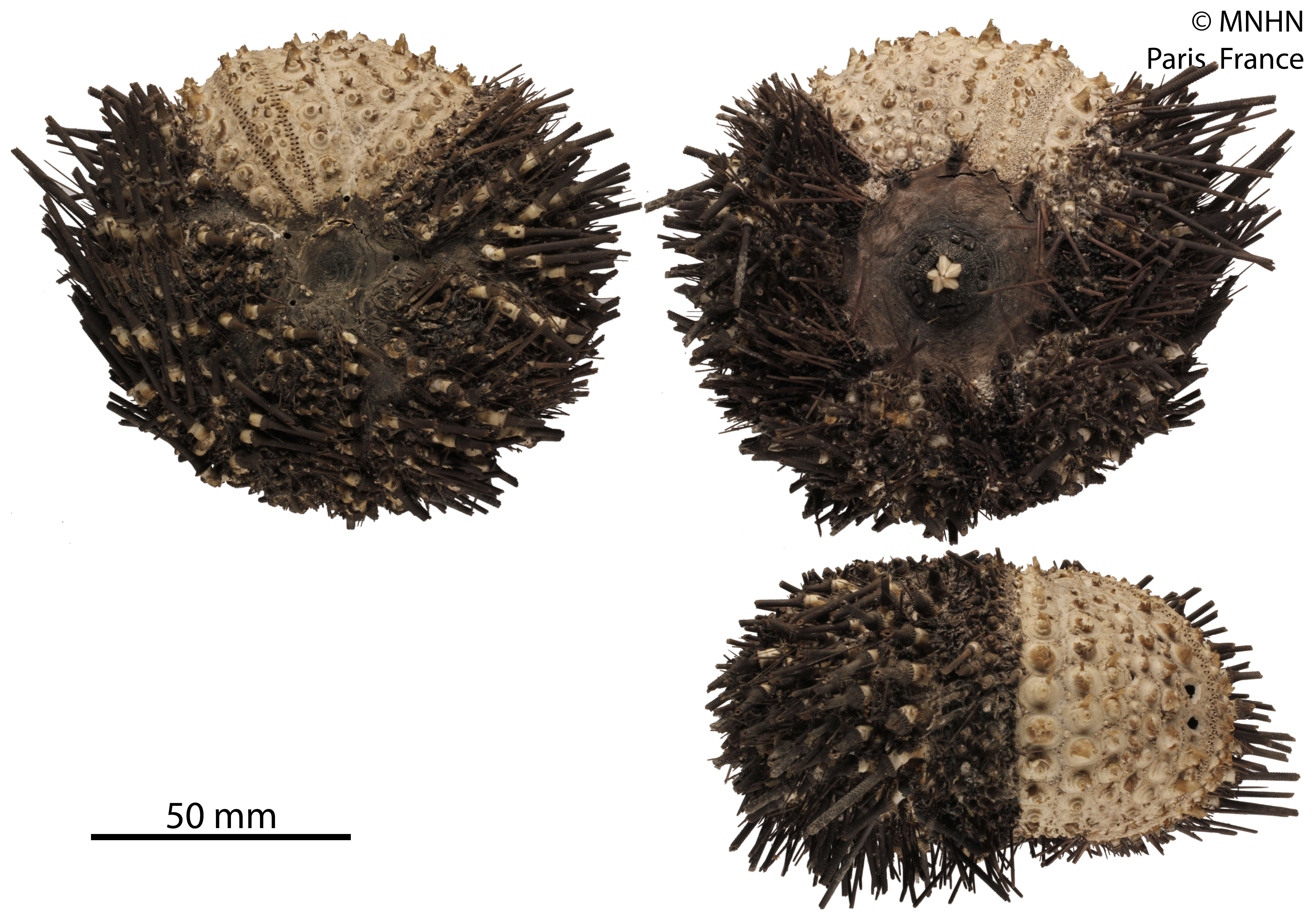 Diadema mexicanum, collection du Muséum National d'Histoire Naturelle (Paris, France).